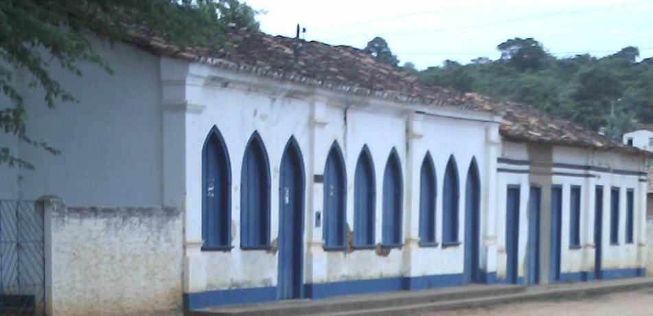 Imagem da arquitetura de Cachoeirinha, Wagner, Bahia, Brasil.